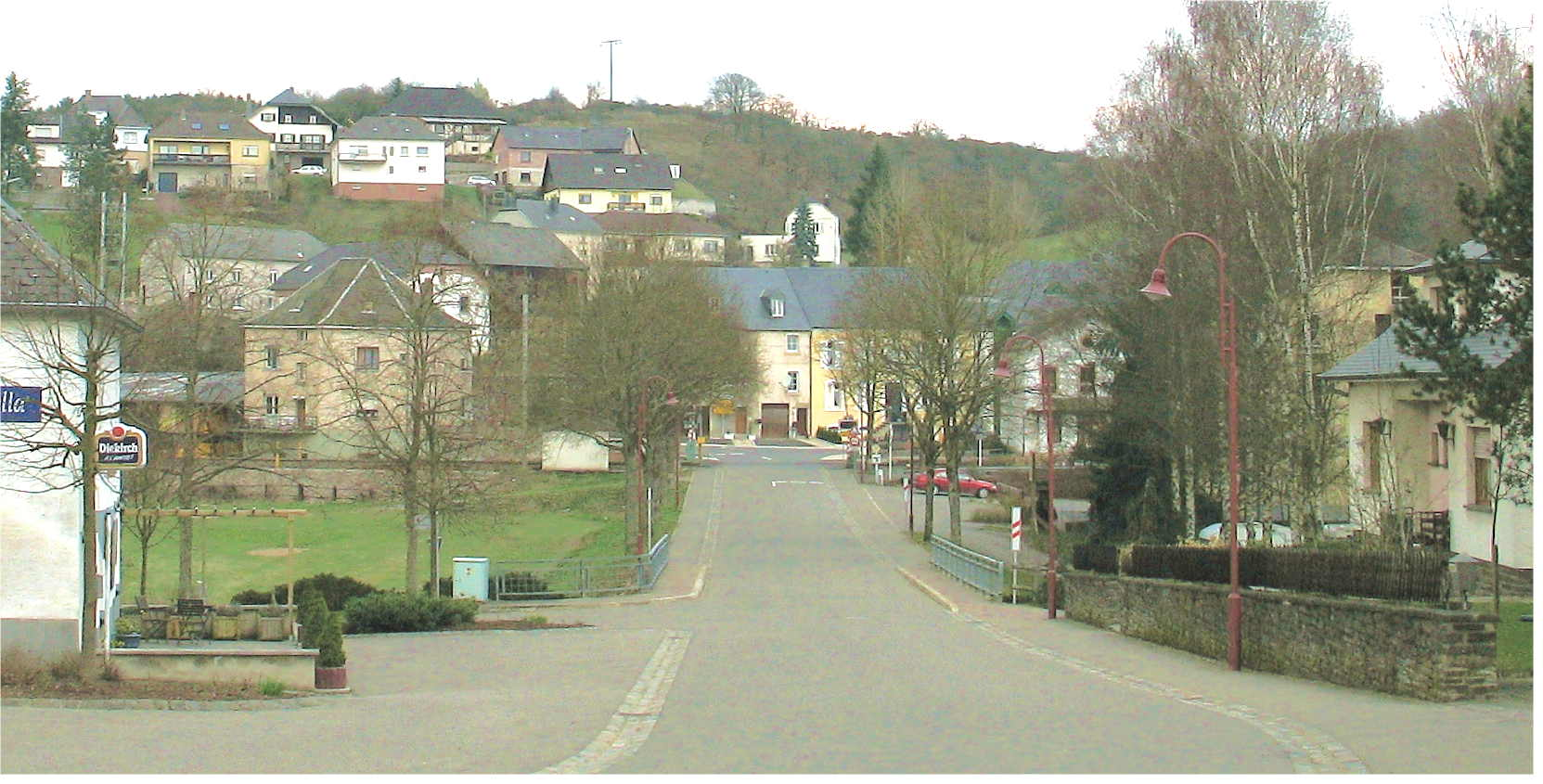 Wëlwerwolz